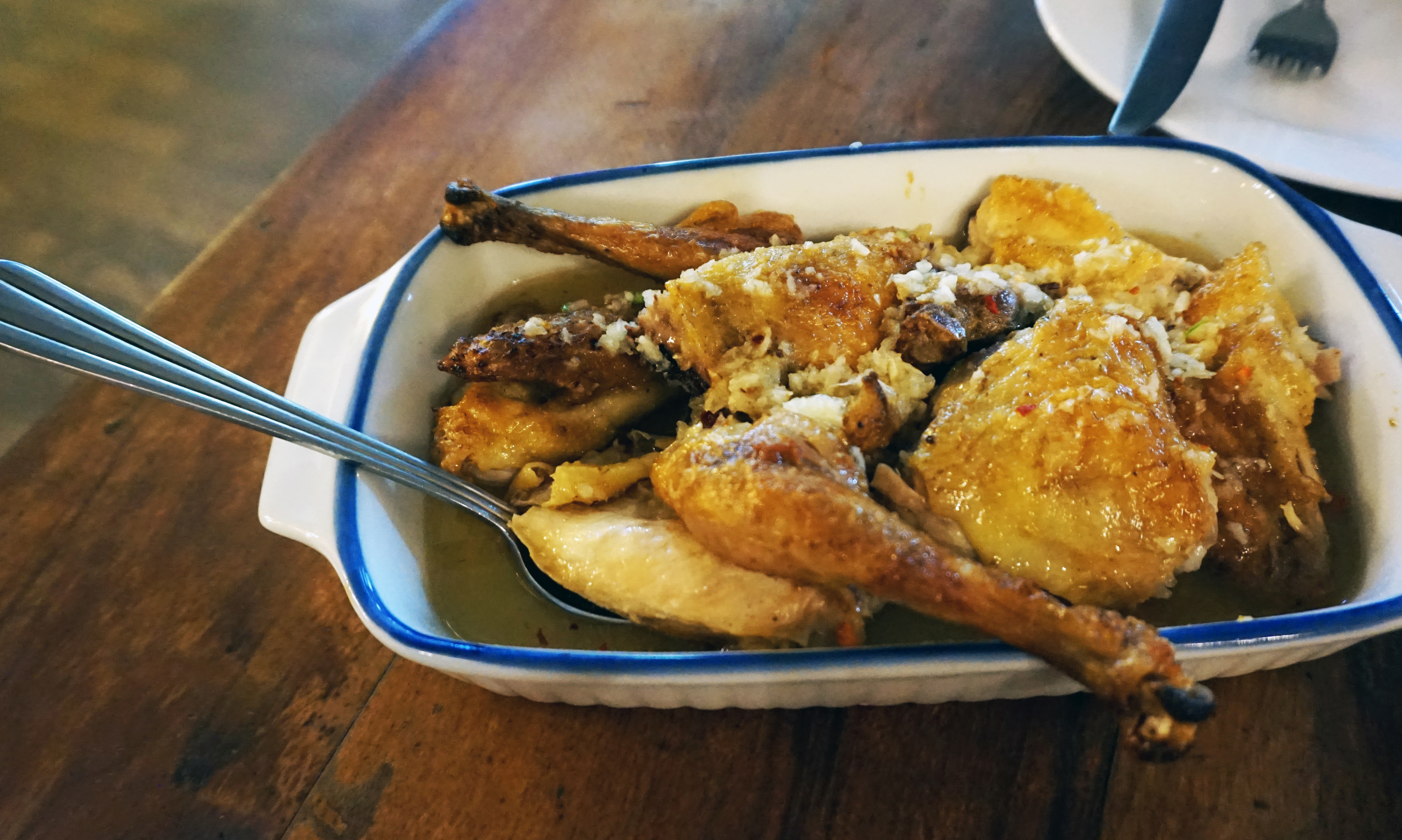 格鲁吉亚蒜酱鸡肉。